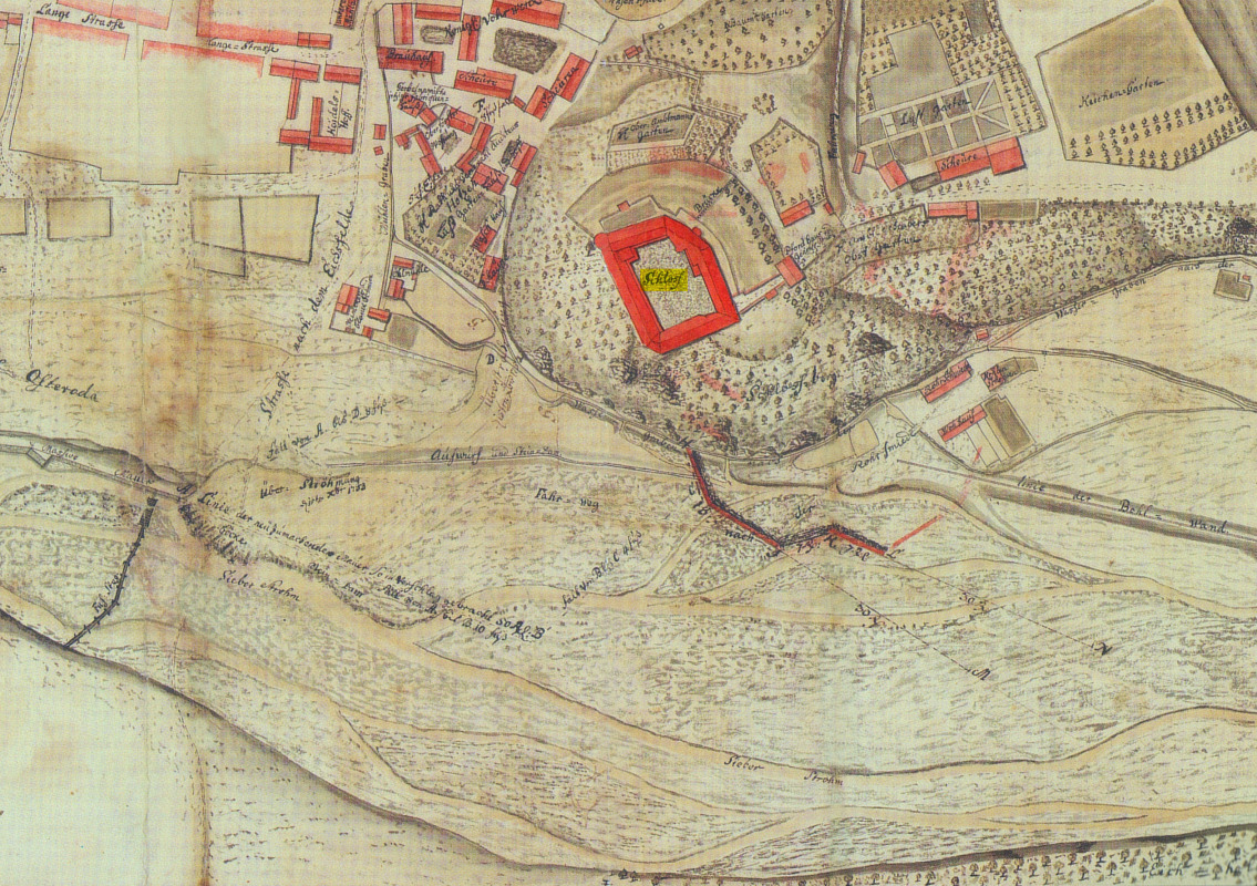 Herzberg 1753 (Ausschnitt)